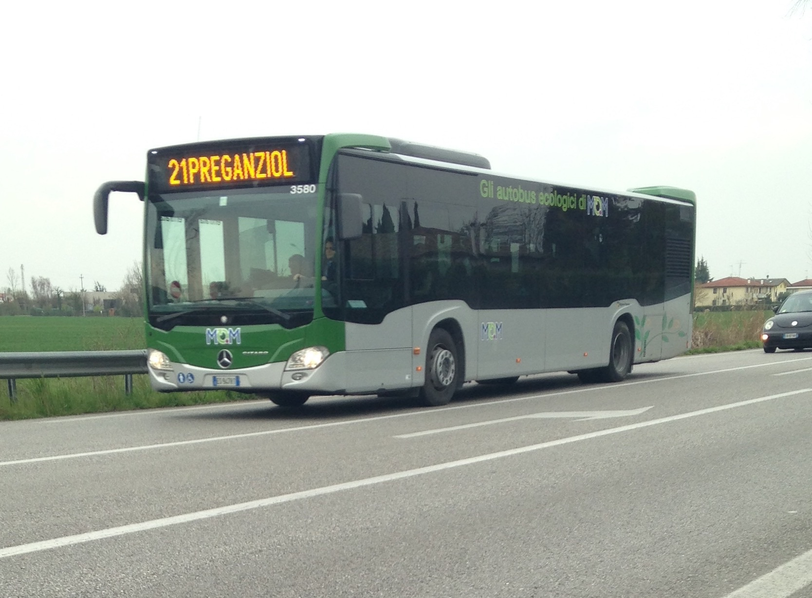 autobus 3580 Mercedes Benz Citaro Euro 6 ecologico a metano di MOM - Mobilità di Marca (ex ACTT Treviso) in servizio sulla Linea 21 Urbana in direzione Preganziol